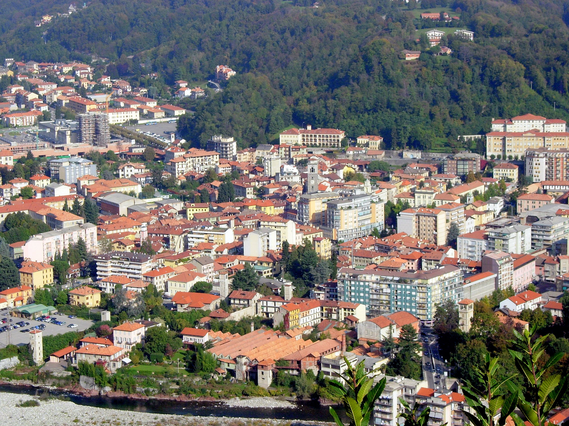 Panorama di Borgosesia.